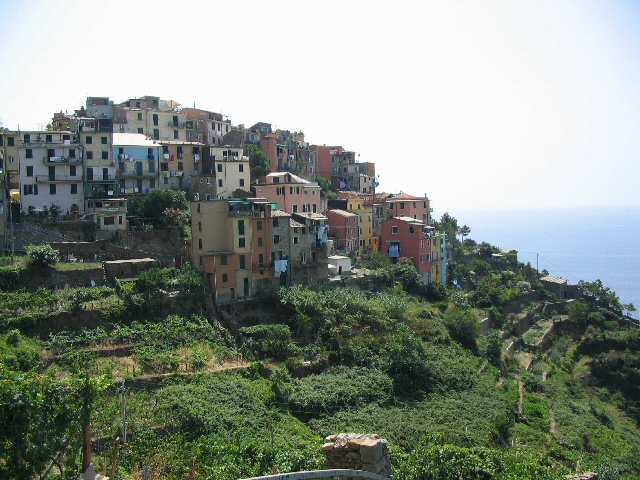 Corniglia (Parco Nazionale delle Cinque Terre, La Spezia, Ligurië, Italië) - GFDL - eigen werk (Sixtus).